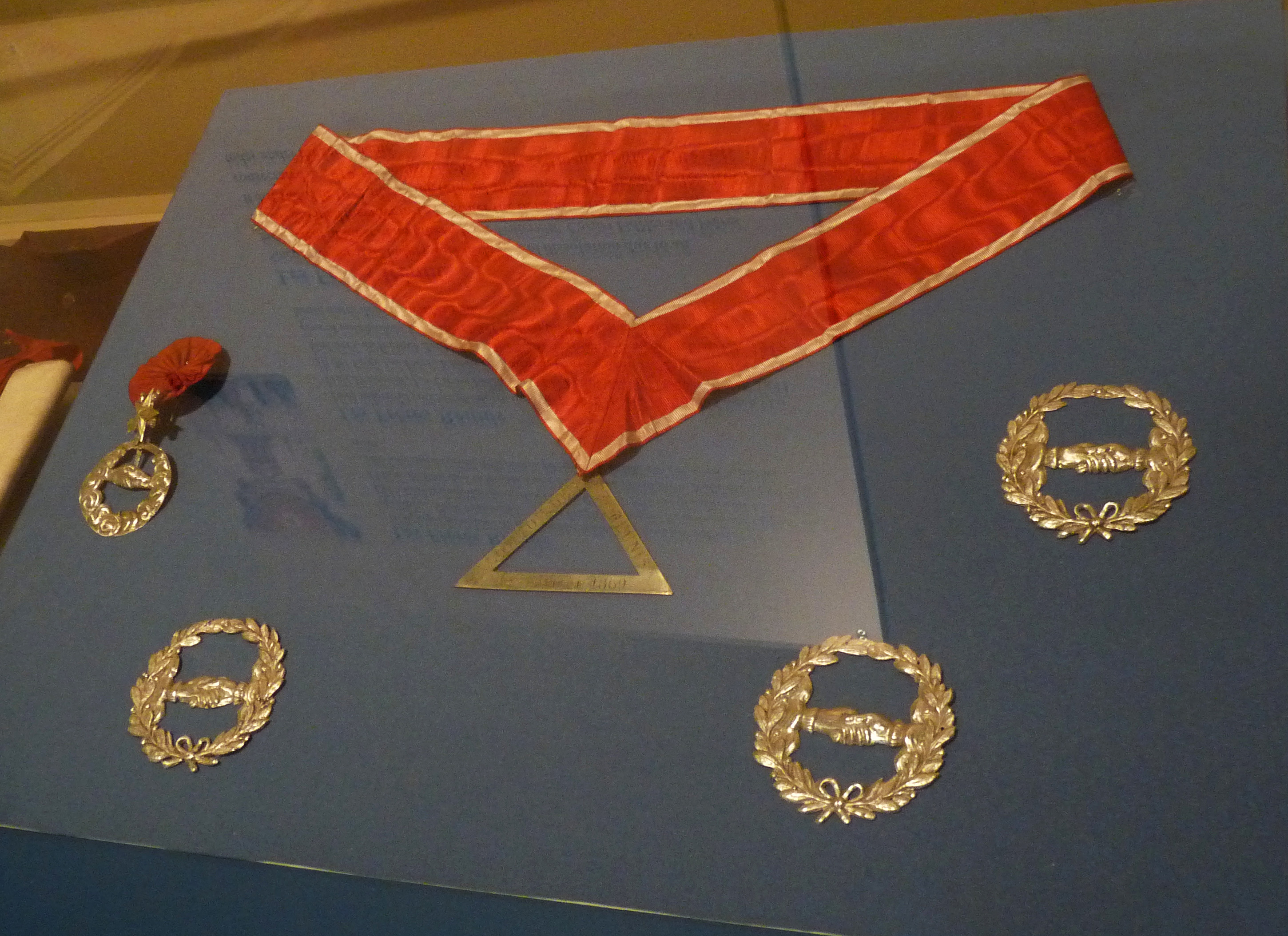 Franc-maçonnerie à Strasbourg : bijoux de la loge des Frères Réunis (1811-1872), en métal doré